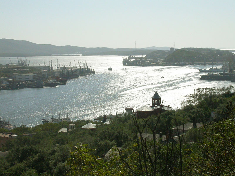 главная морская гавань Владивостока - столицы Приморского края России Автор: Дмитрий Яковлев (lite), Время создания: сентябрь 2004 г.